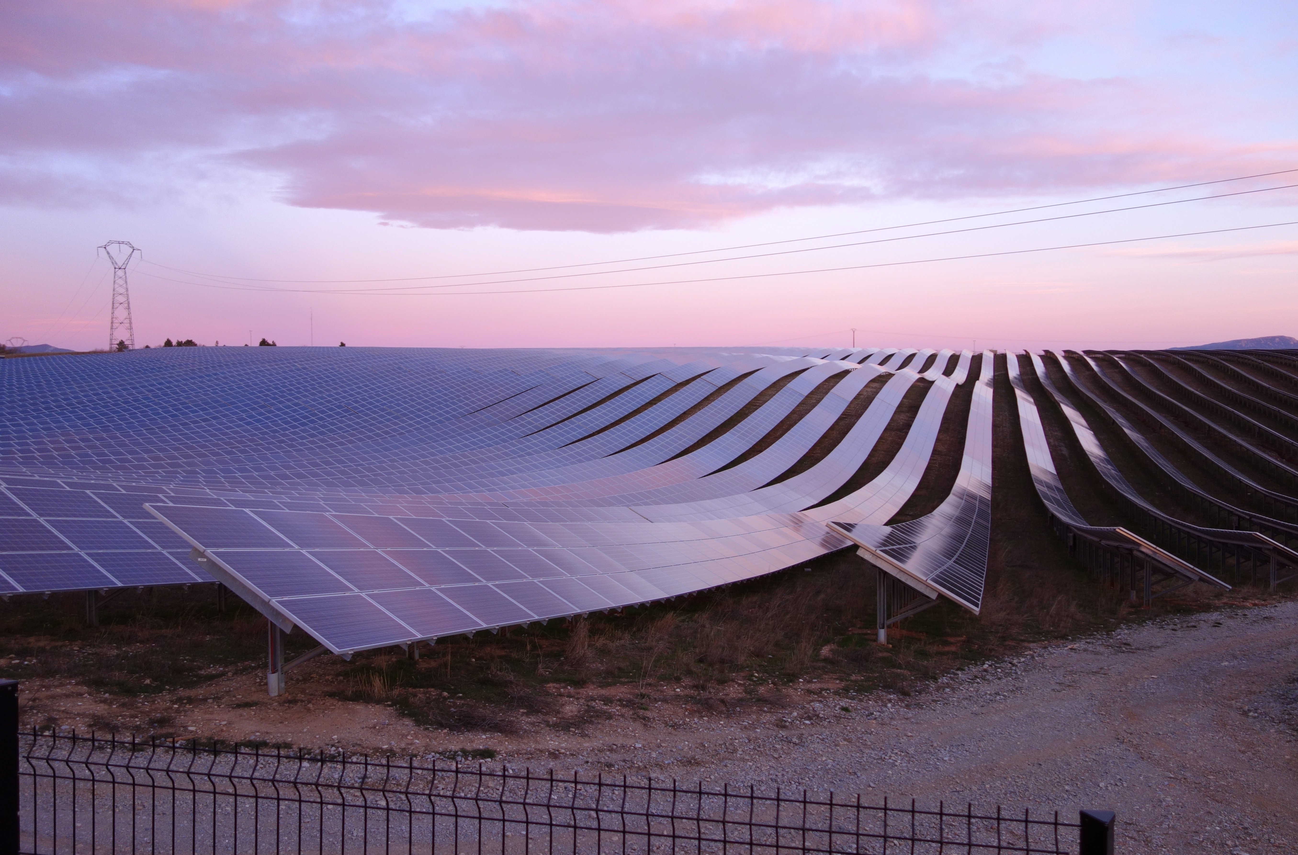 Panneaux photovoltaïques au coucher du soleil, commune des Mées (Alpes-de-Haute-Provence, France)